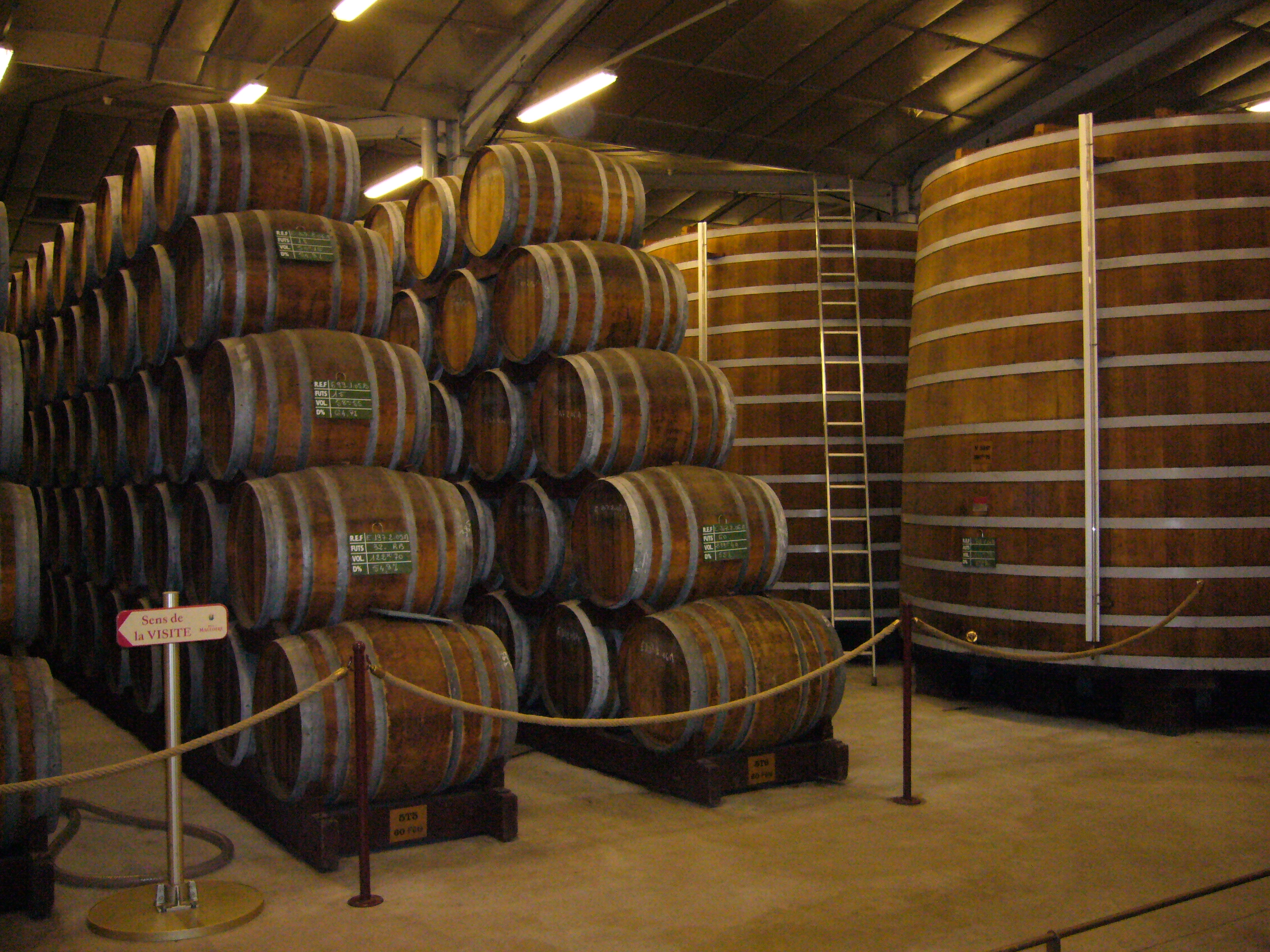 Tonnen met Calvados bij PÃ¨re Magloire, Frankrijk